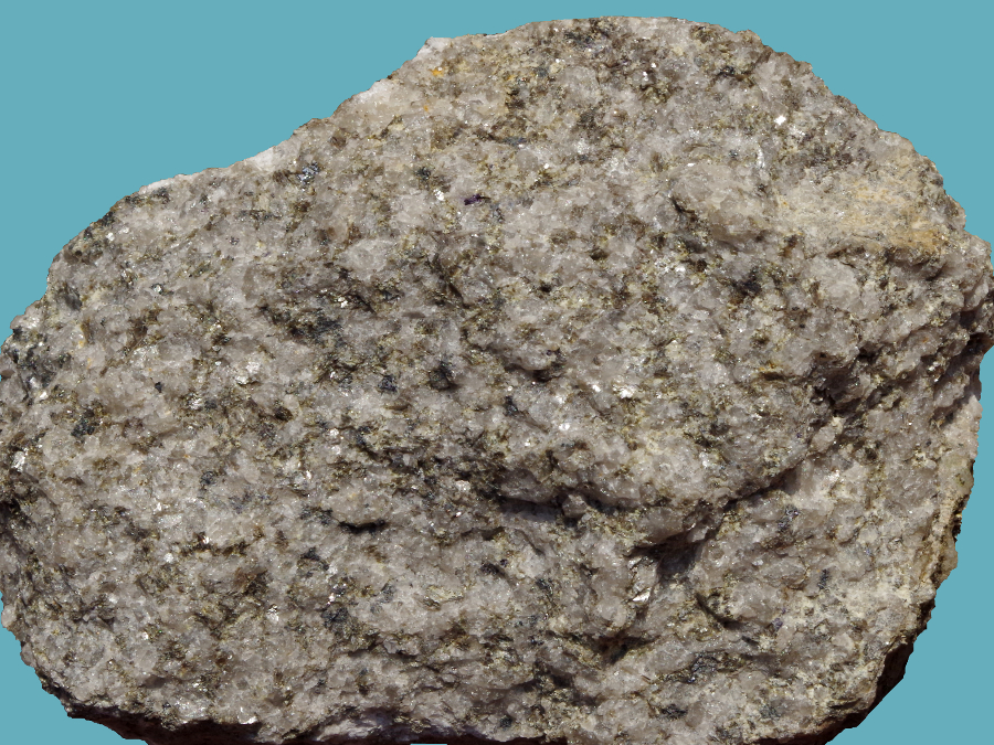 Vzorek greisenu z Cínovce. Skutečná šířka záběru je 12 cm.